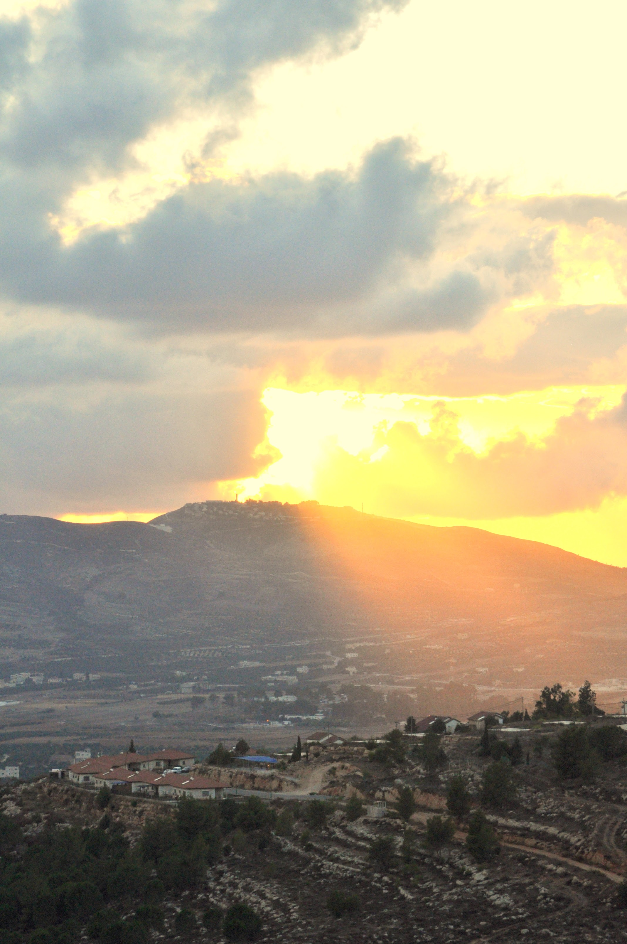 זריחה באיתמר